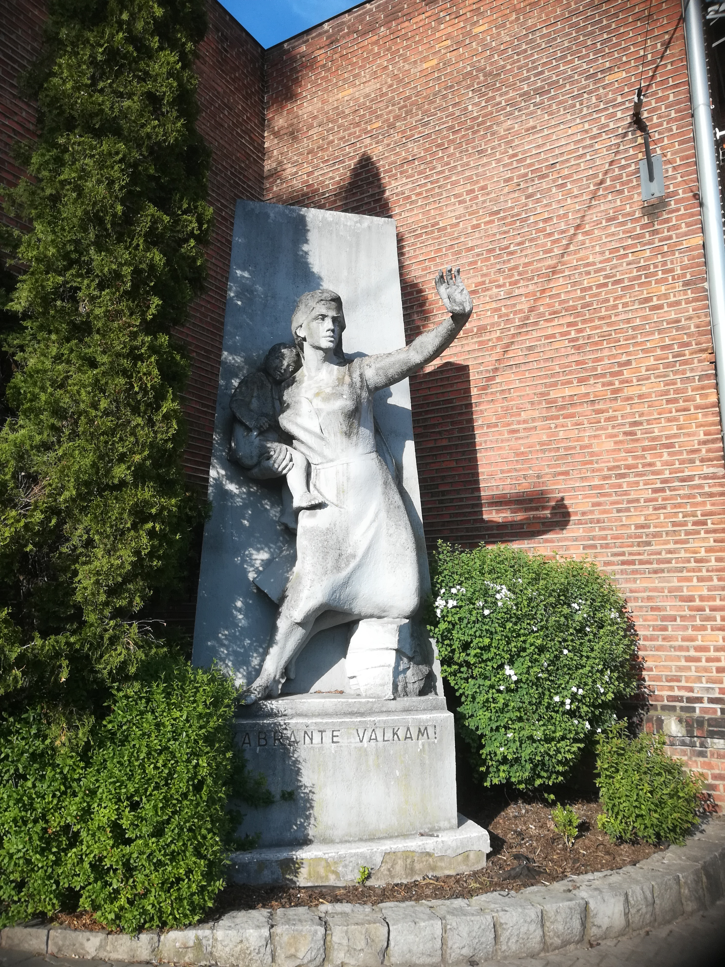 Socha Zabraňte válkám v Ostravě-Michálkovicích od sochaře Antonína Ivanského